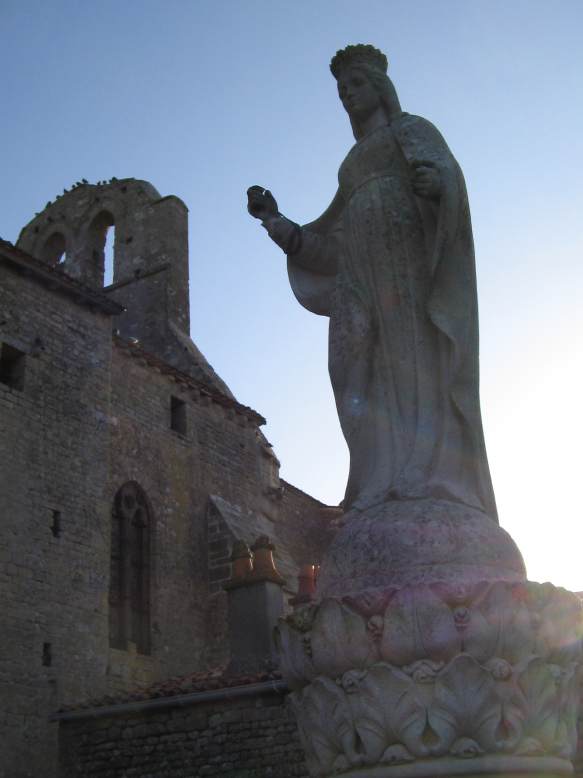 la place de l'église à Genouillé (17) en Septembre 2011